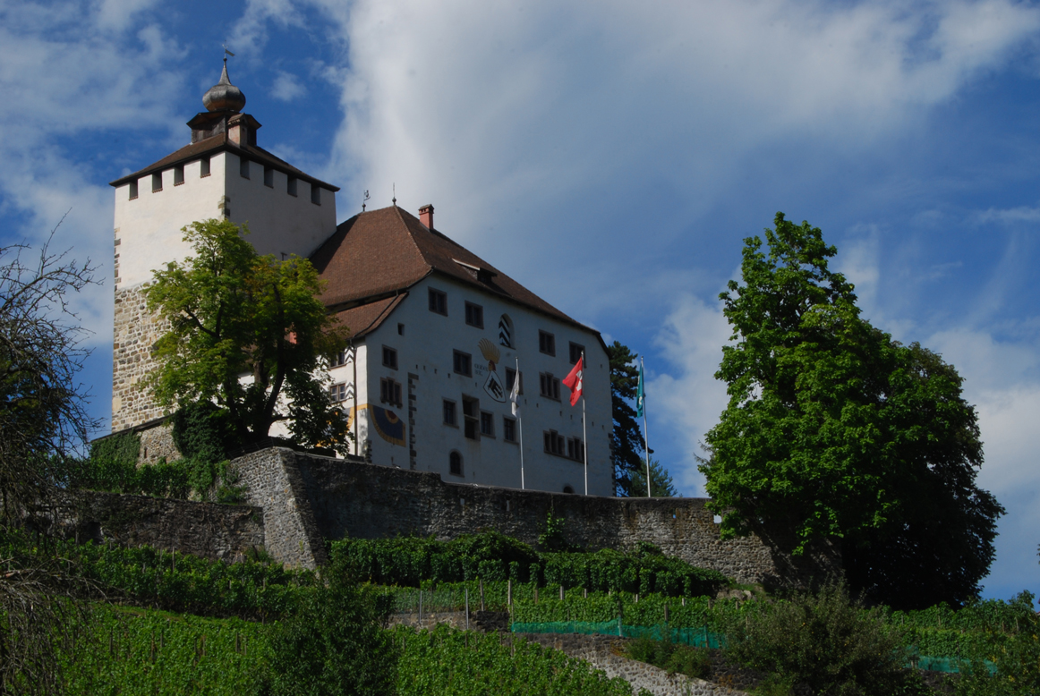 Schloss Werdenberg SG (2)